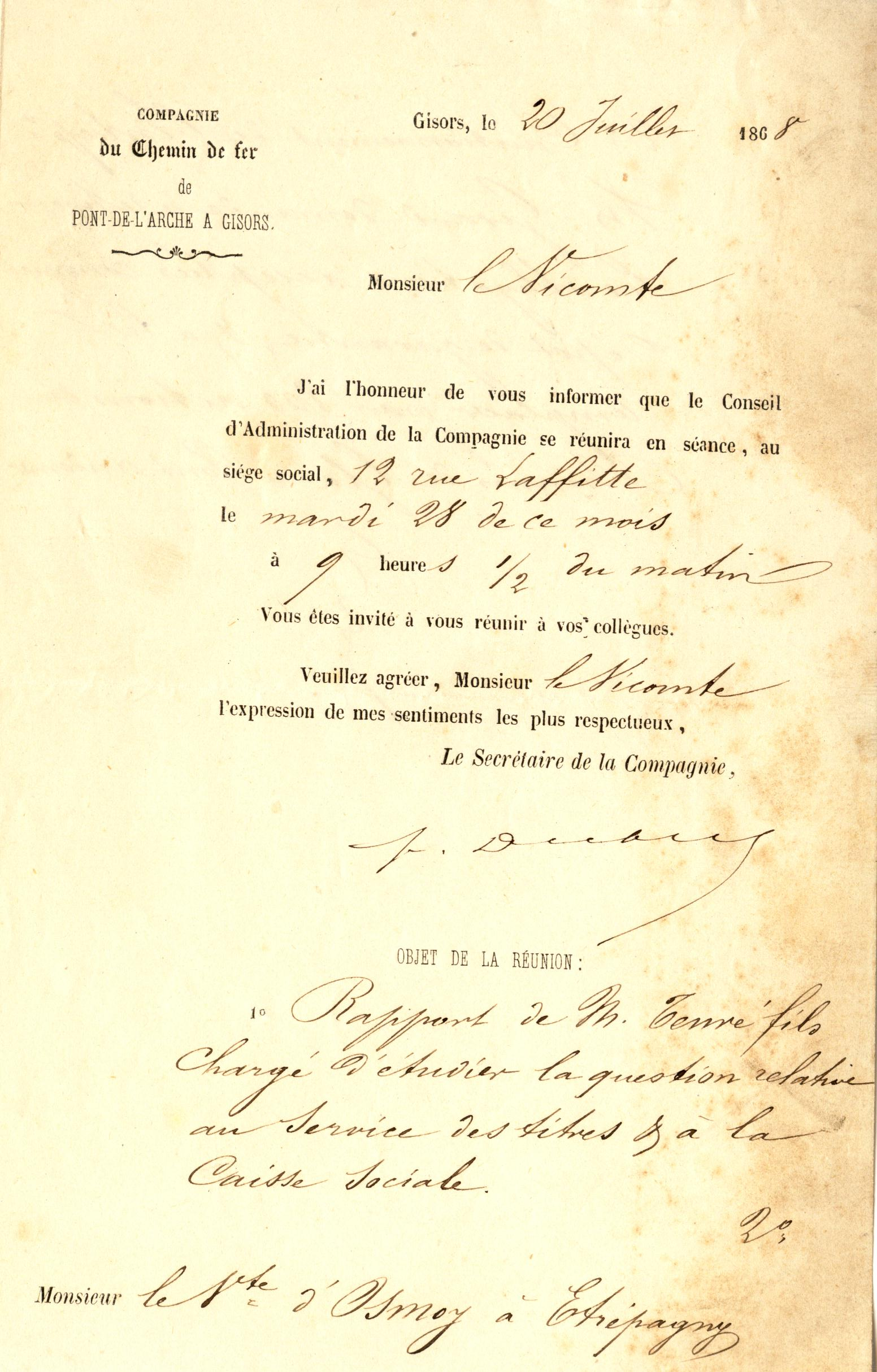 Avis de réunion de la compagnie de chemin de fer de Gisors à Pont-de-l'Arche, adressé au vicomte d'Osmoy.